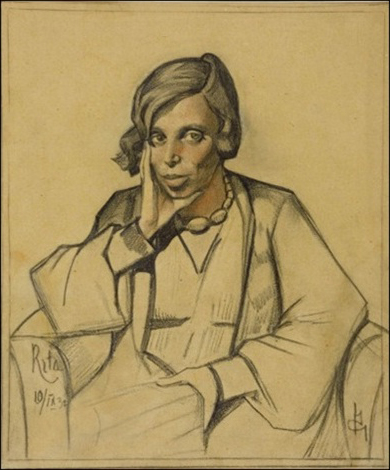 Portrait of Rita Rait-Kovaleva